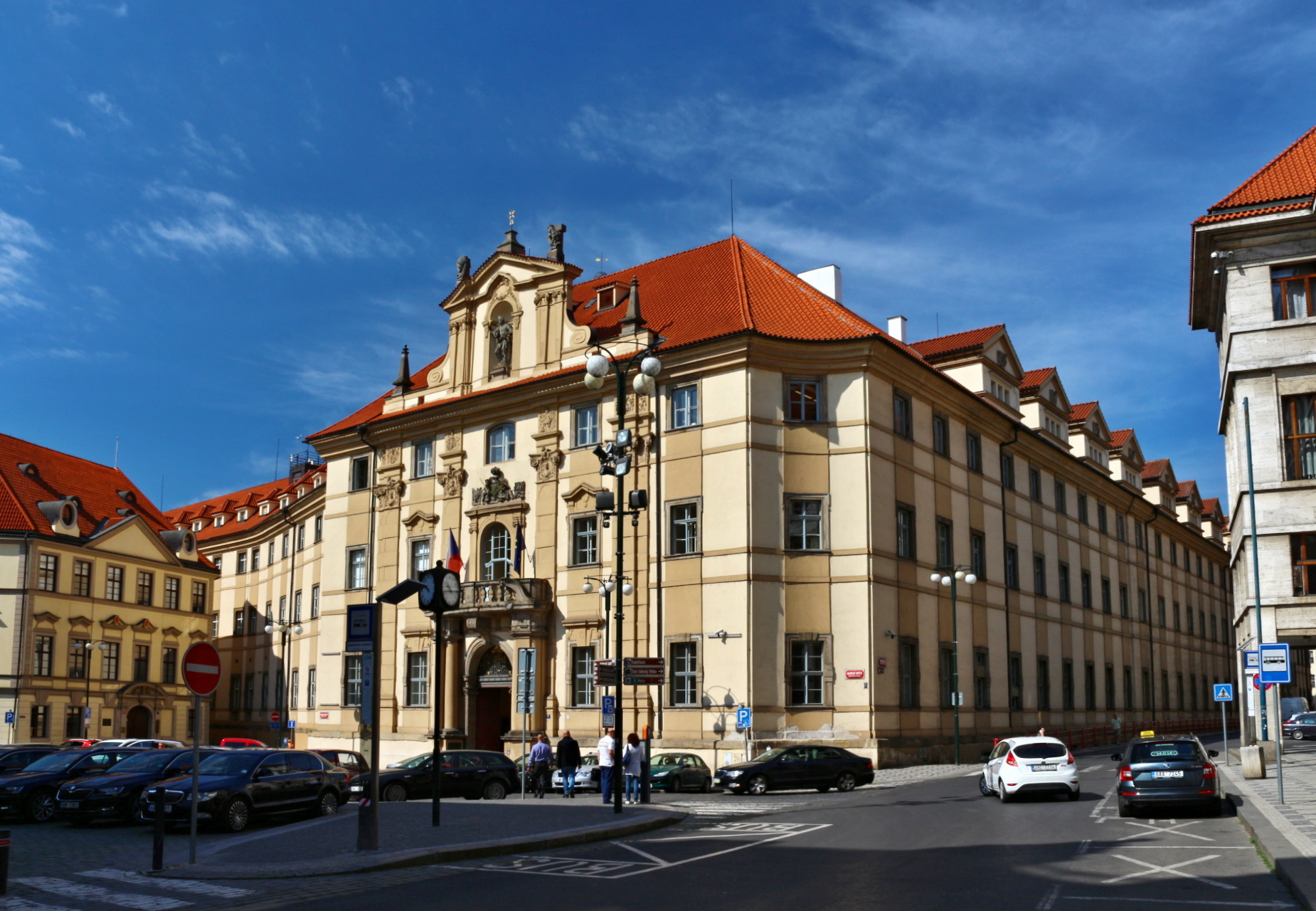 Klementinum